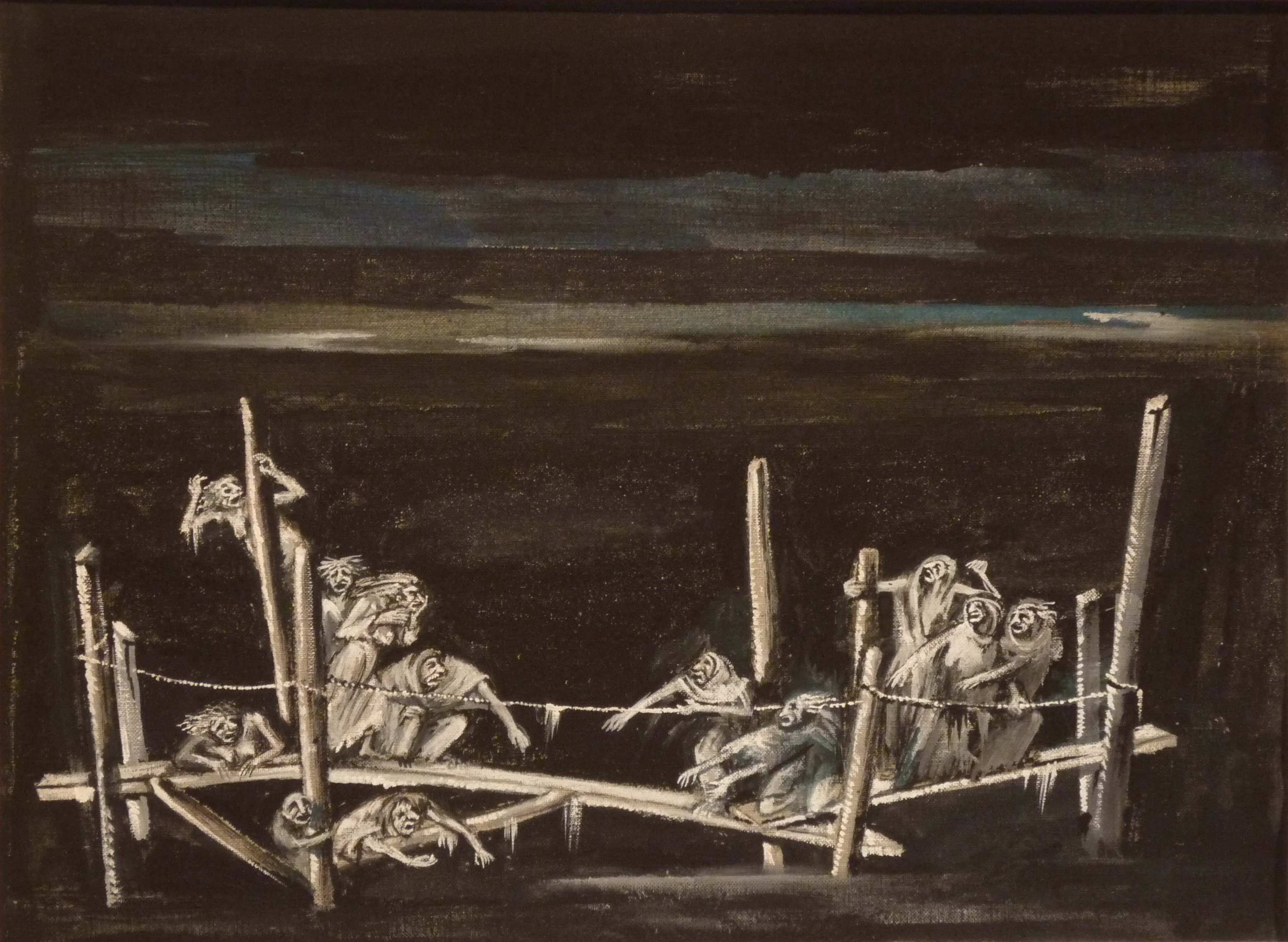 Bühnenbildentwurf von Helmut Jürgens für "Die Bernauerin" von C. Orff, Aufführung München 1954